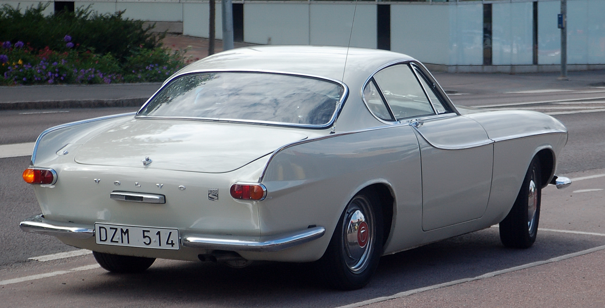 Fabrikat: VOLVO 18334 VB Färg: VIT Fordonsår: 1963 Växellåda: MANUELL Antal passagerare, max: 1 Tjänstevikt, kg: 1210 Längd, mm: 4360 Bredd, mm: 1700 Drivmedel 1: BENSIN Tankvolym, liter: 45 Motoreffekt, kW: 79,0 Effektnorm: SAE